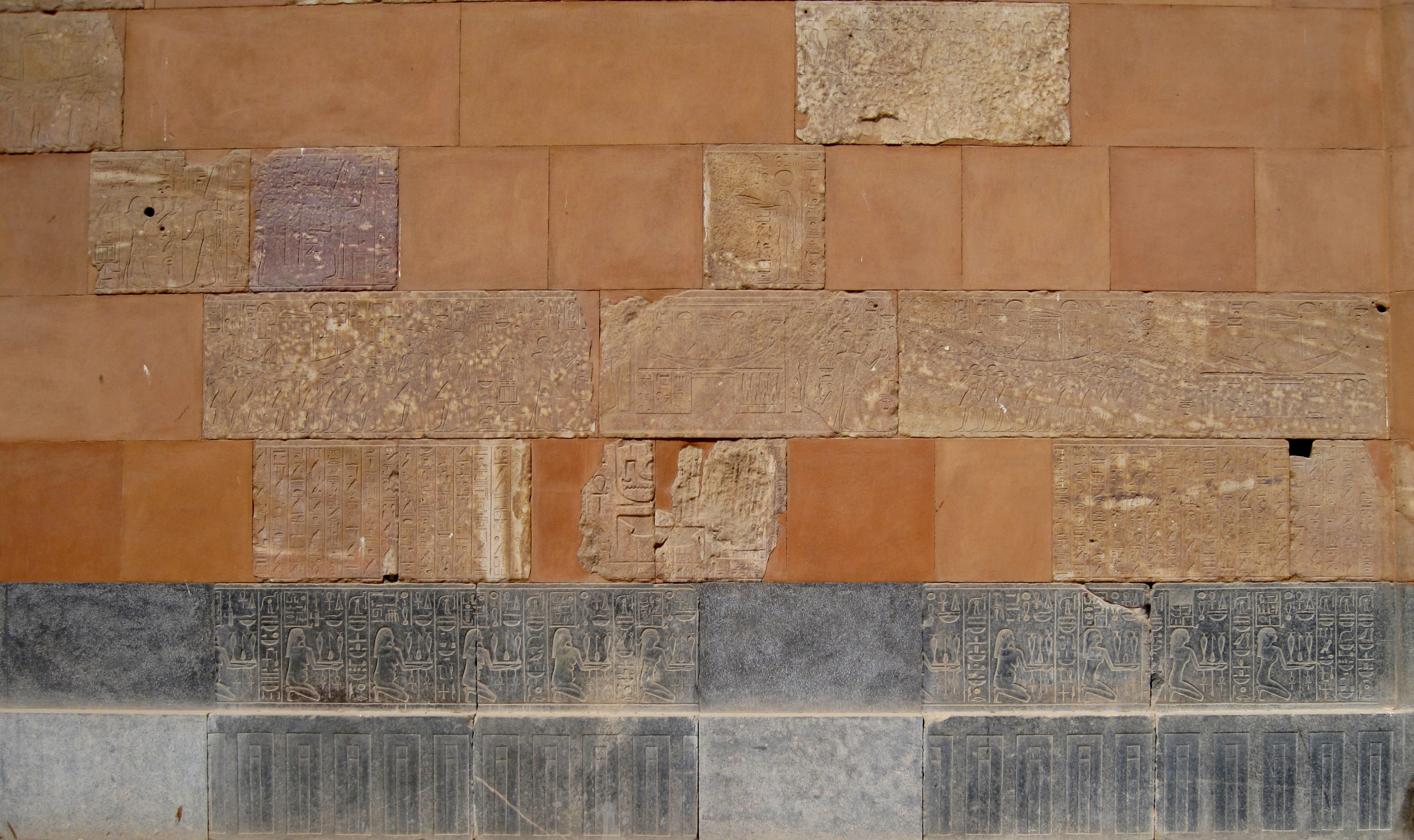 Außenreliefs an der im Jahr 2000 wiedererrichteten Roten Kapelle der Hatschepsut im Freilichtmuseum von Karnak, nördlich von Luxor, Ägypten